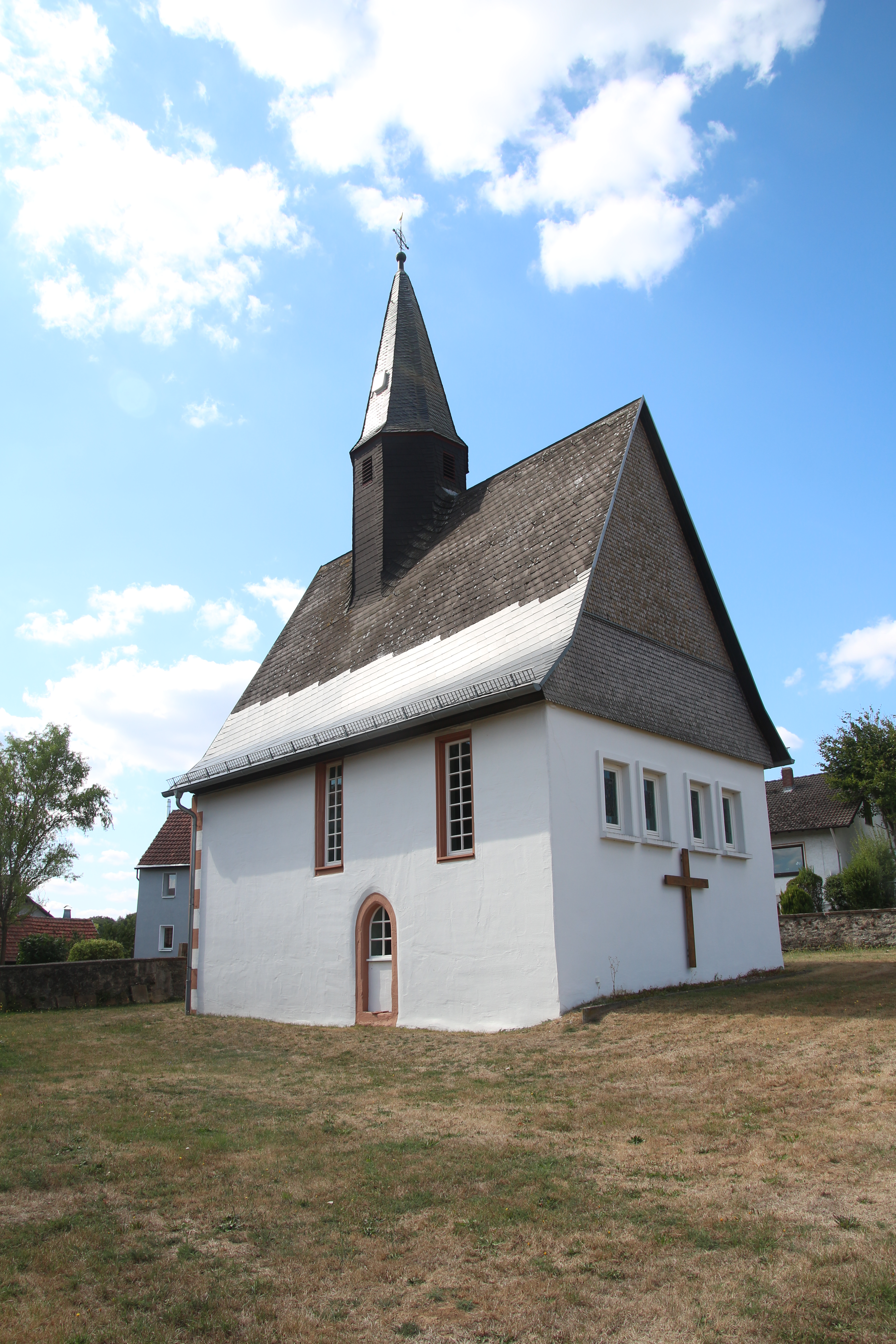 Evangelische Kirche Unter-Lais, Gemeinde Nidda, Wetteraukreis, Hessen